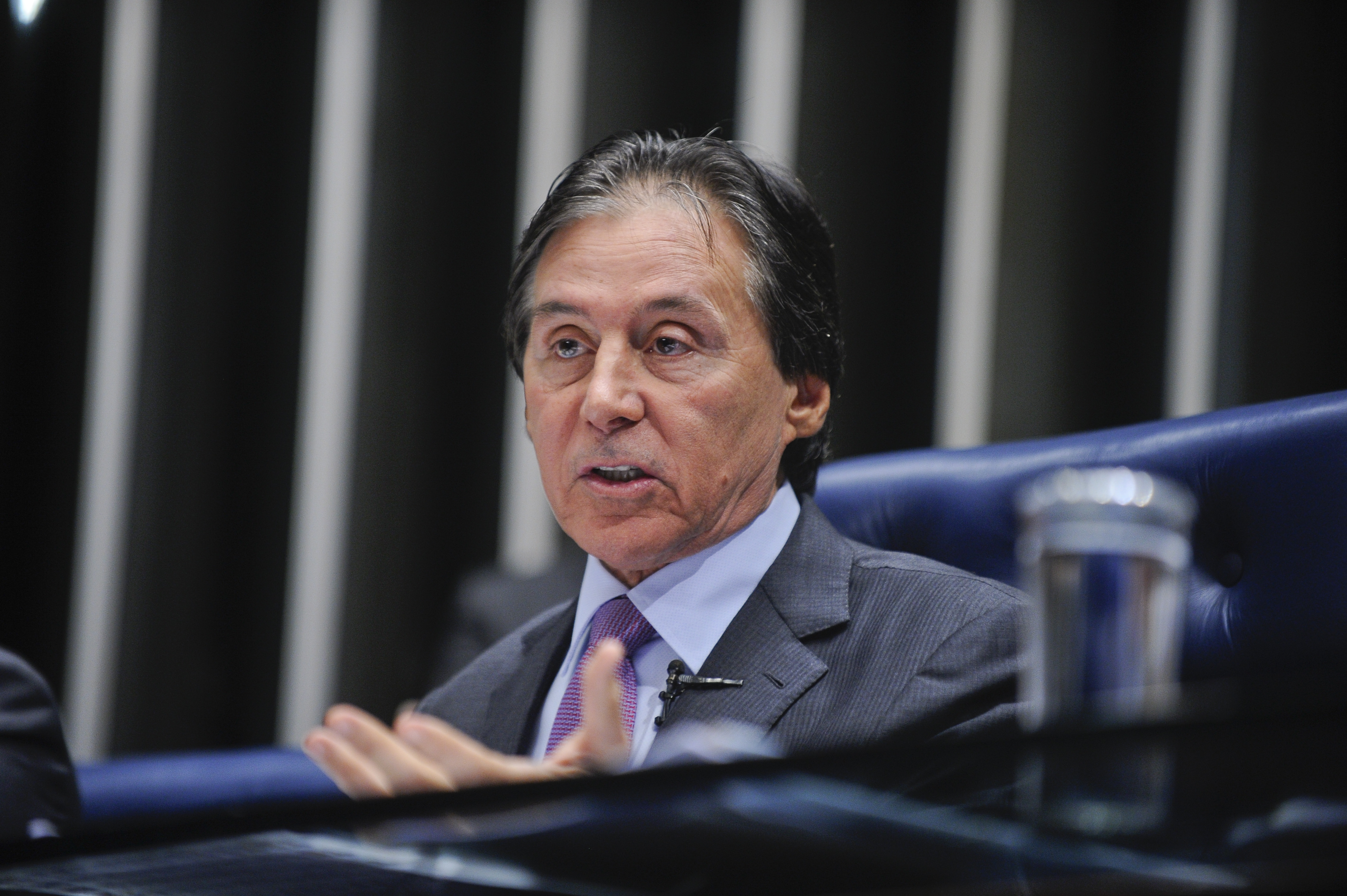 Plenário do Senado durante sessão deliberativa ordinária. Em pronunciamento, presidente do Senado, senador Eunício Oliveira (PMDB-CE). Foto: Marcos Oliveira/Agência Senado